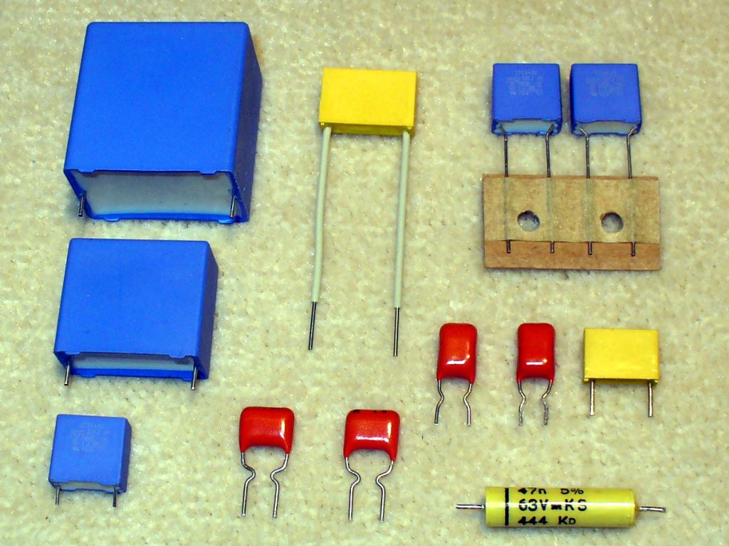 Axiale, Radiale Kunststoff-Folienkondensatoren